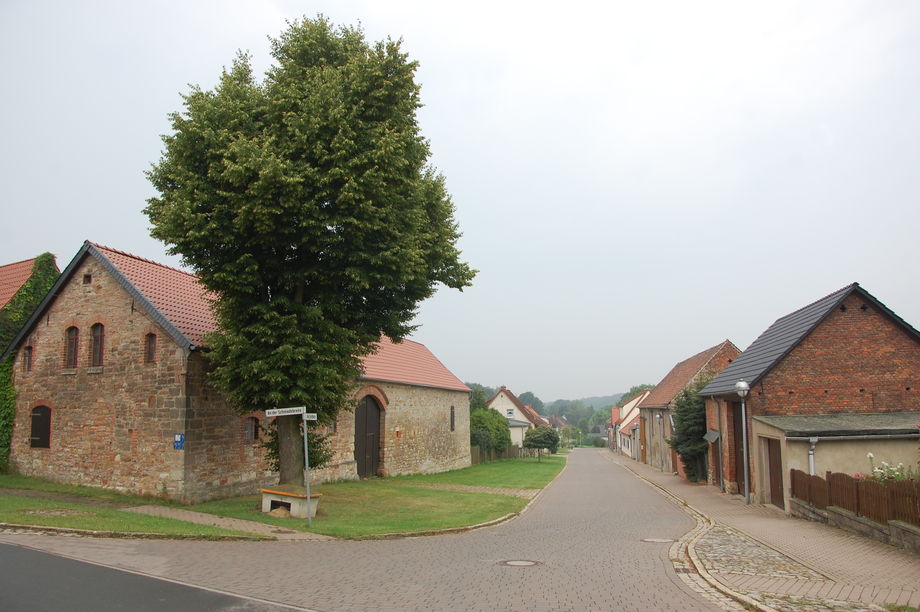 Altbrandsleben Straße